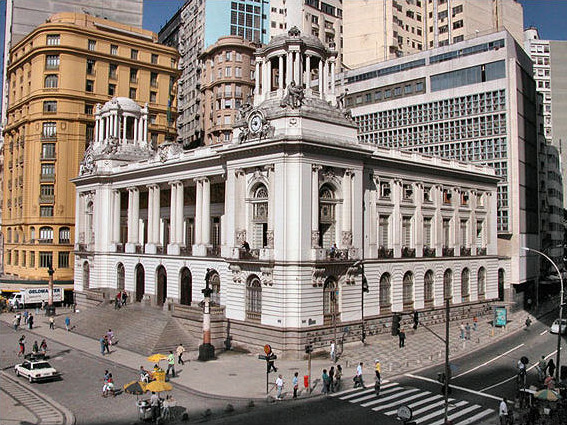 Cinelandia Square in Rio de Janeiro